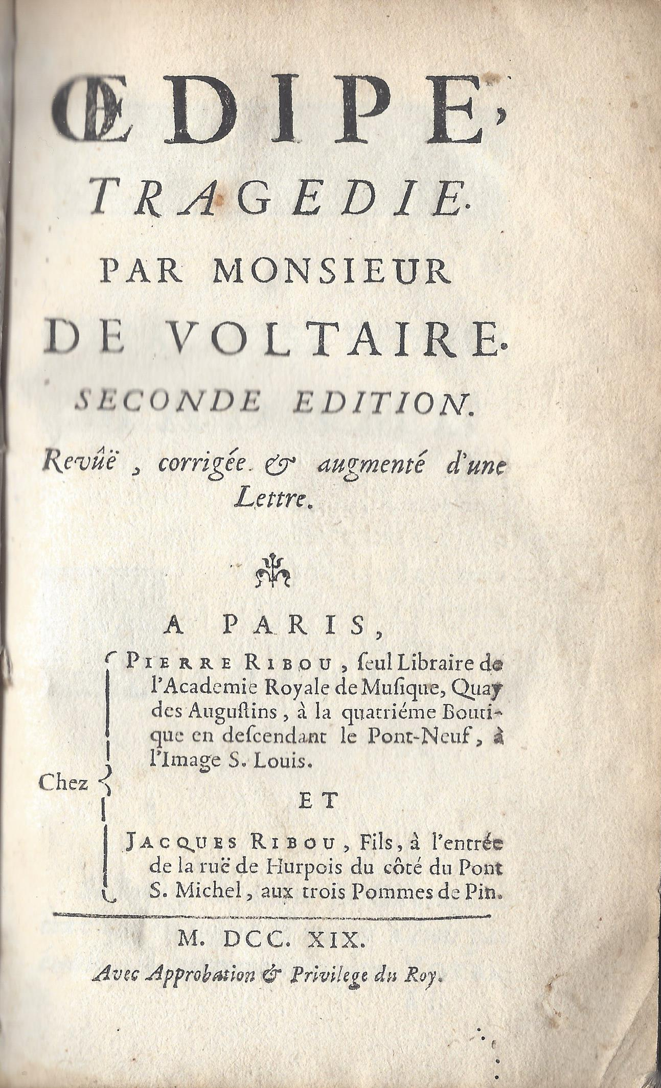 Titelseite der zweiten Buchausgabe des Oedipe von Voltaire Ribou und Huet, Paris 1719. Scan von einem eigenen Exemplar des Typ B.